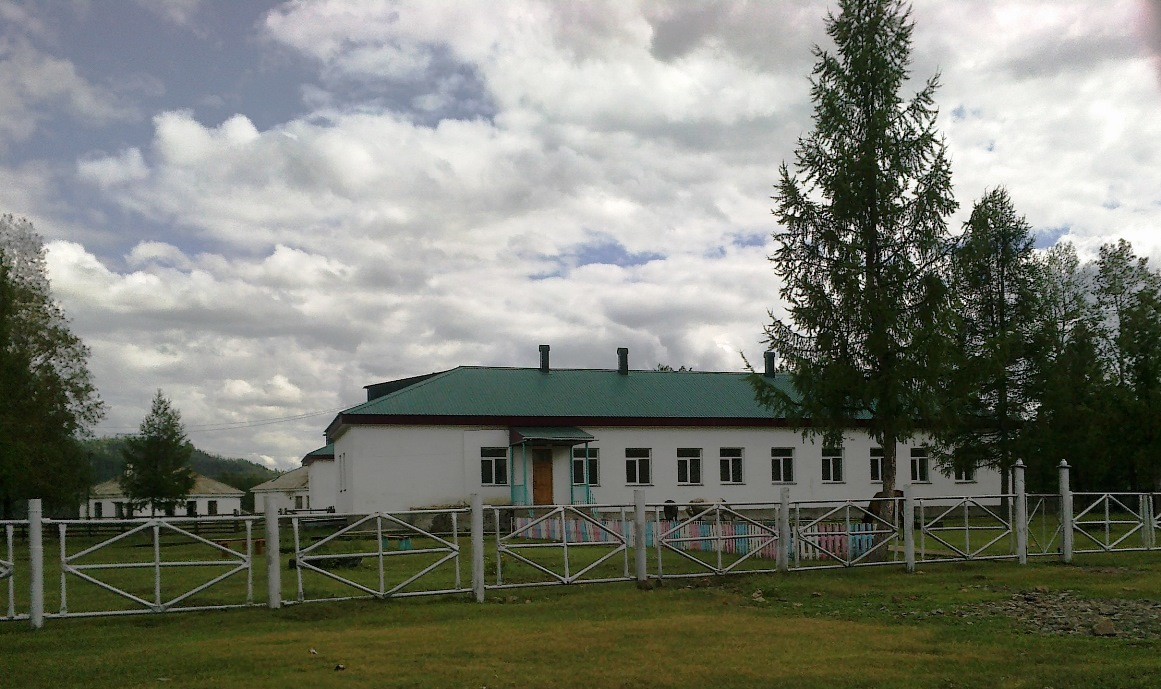 Больница в Баянголе